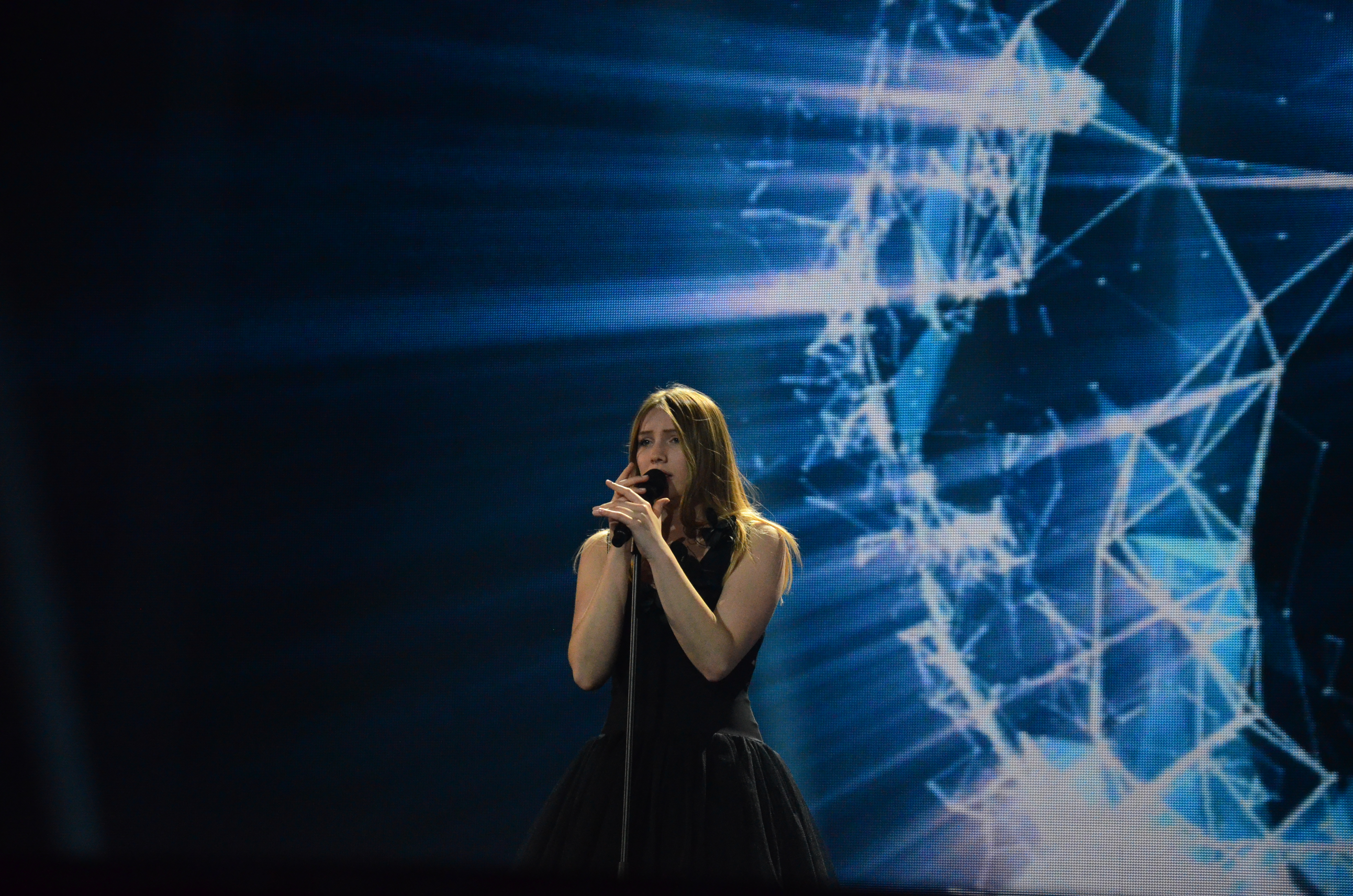 12 травня. Генеральна репетиція фіналу Євробачення 2017. Blanche (Belgium).